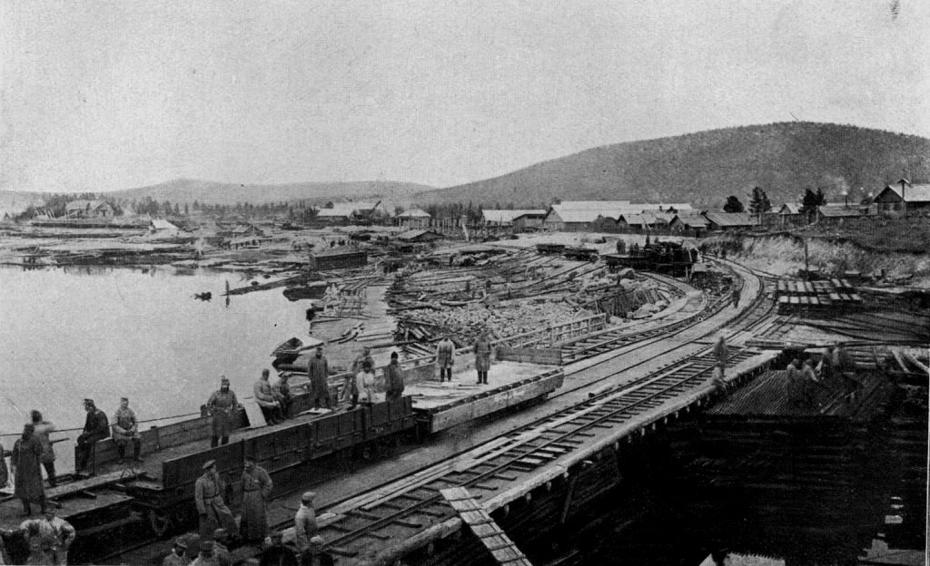 Кандалакша. Строительство пристани. История строительства Мурманской Ж/Д